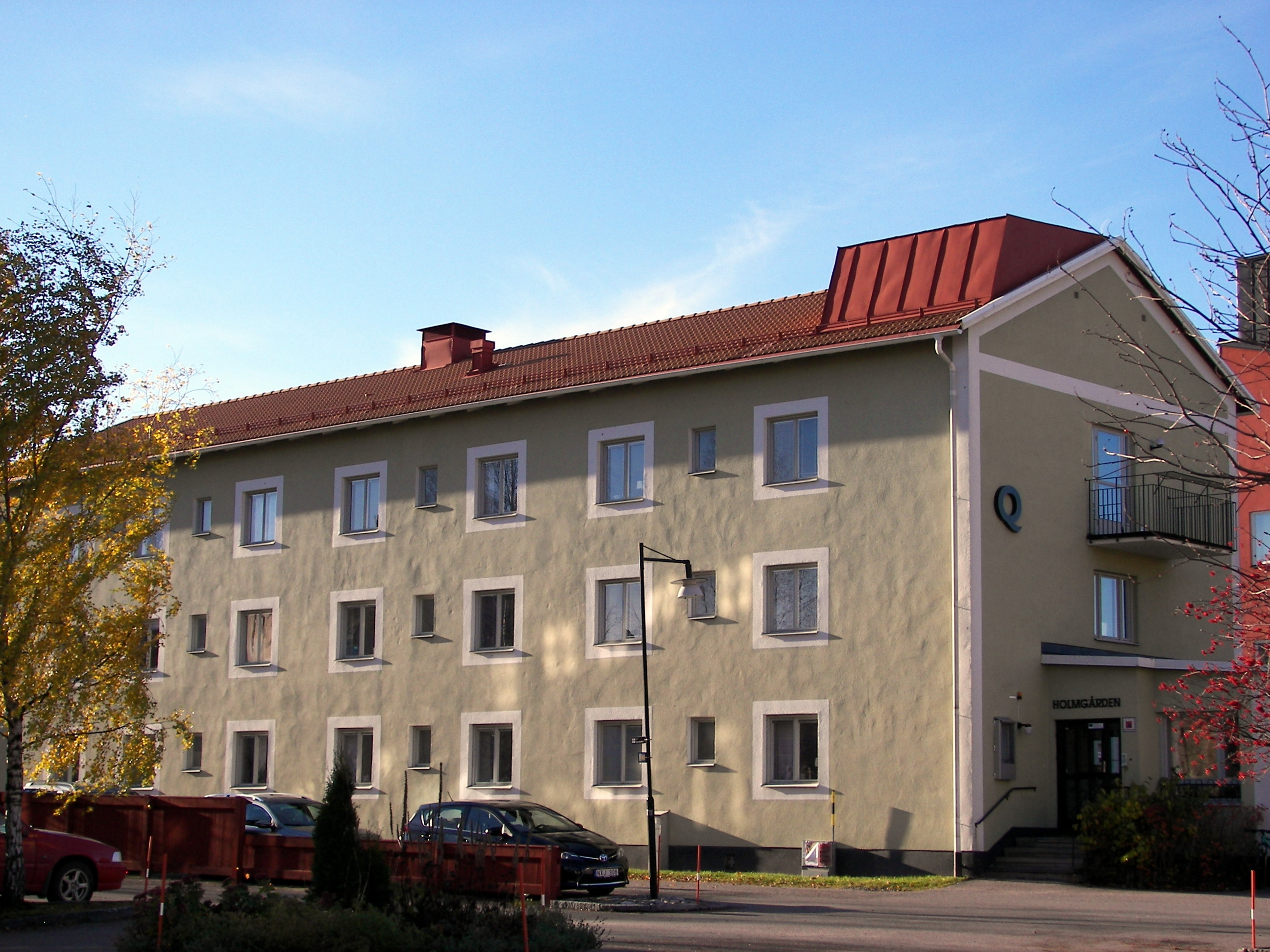 Campus Sundsvall Hus Q - Holmgården.